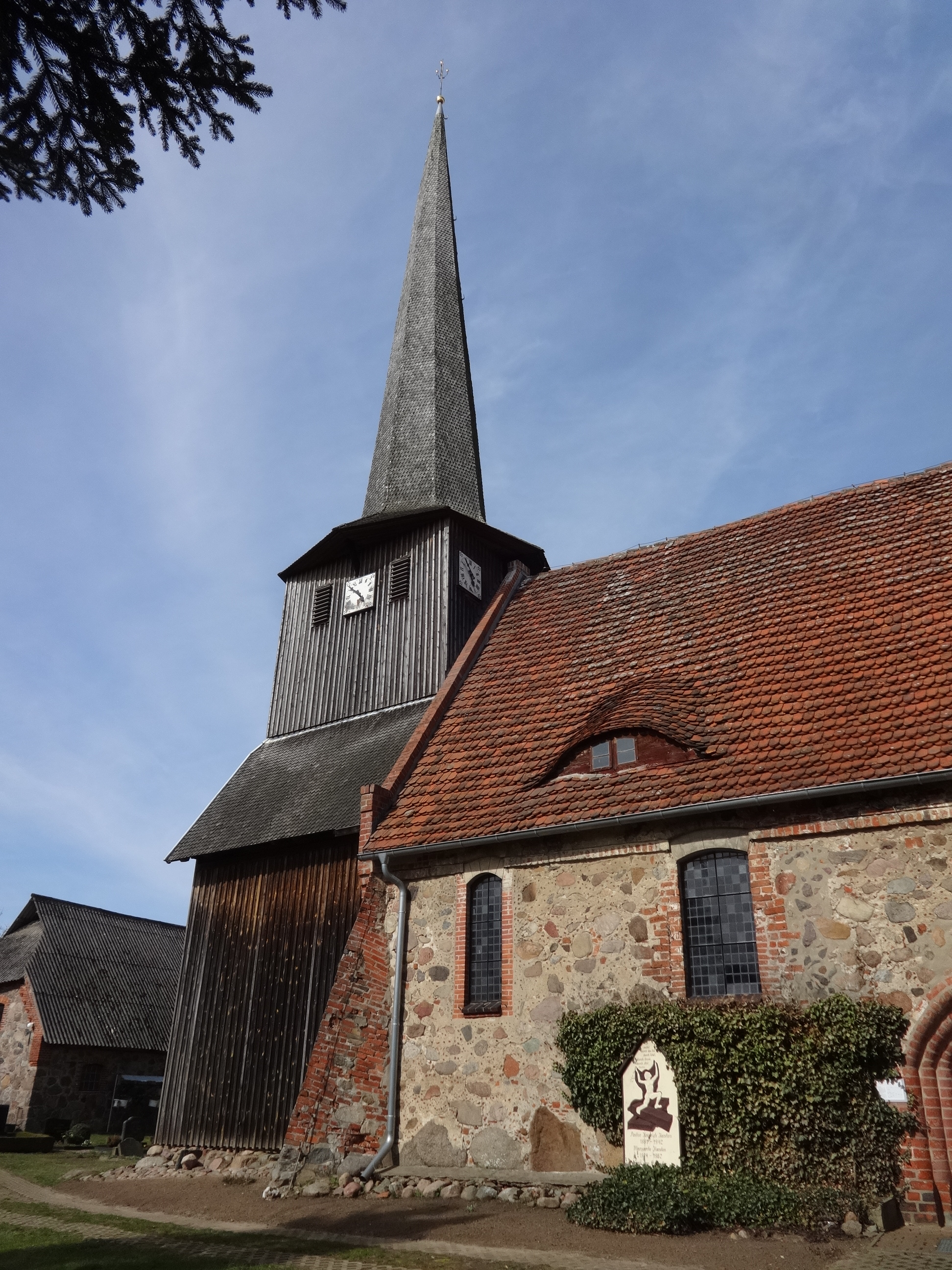 Die Dorfkirche in Suckow ist eine Saalkirche im Landkreis Ludwigslust-Parchim, die vermutlich im 14. Jahrhundert errichtet wurde. In seinem Innern ist ein neugotisches Altarretabel aus dem Jahr 1867